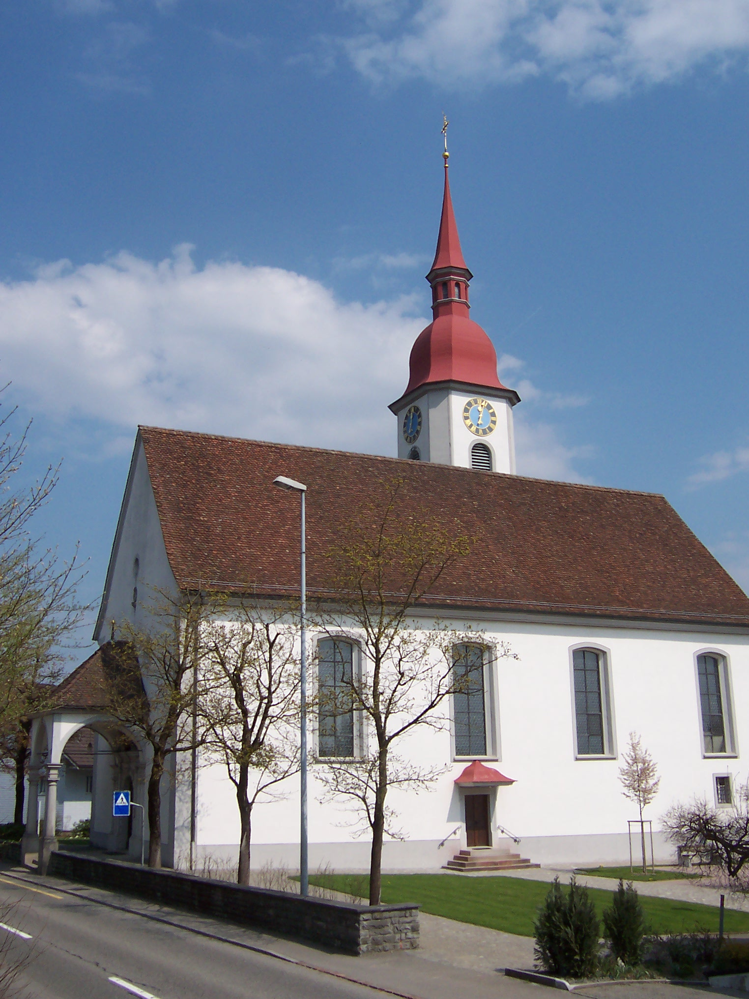 Pfarrkirche St.Nikolaus in Auw, Kanton Aargau, Schweiz (Südansicht)